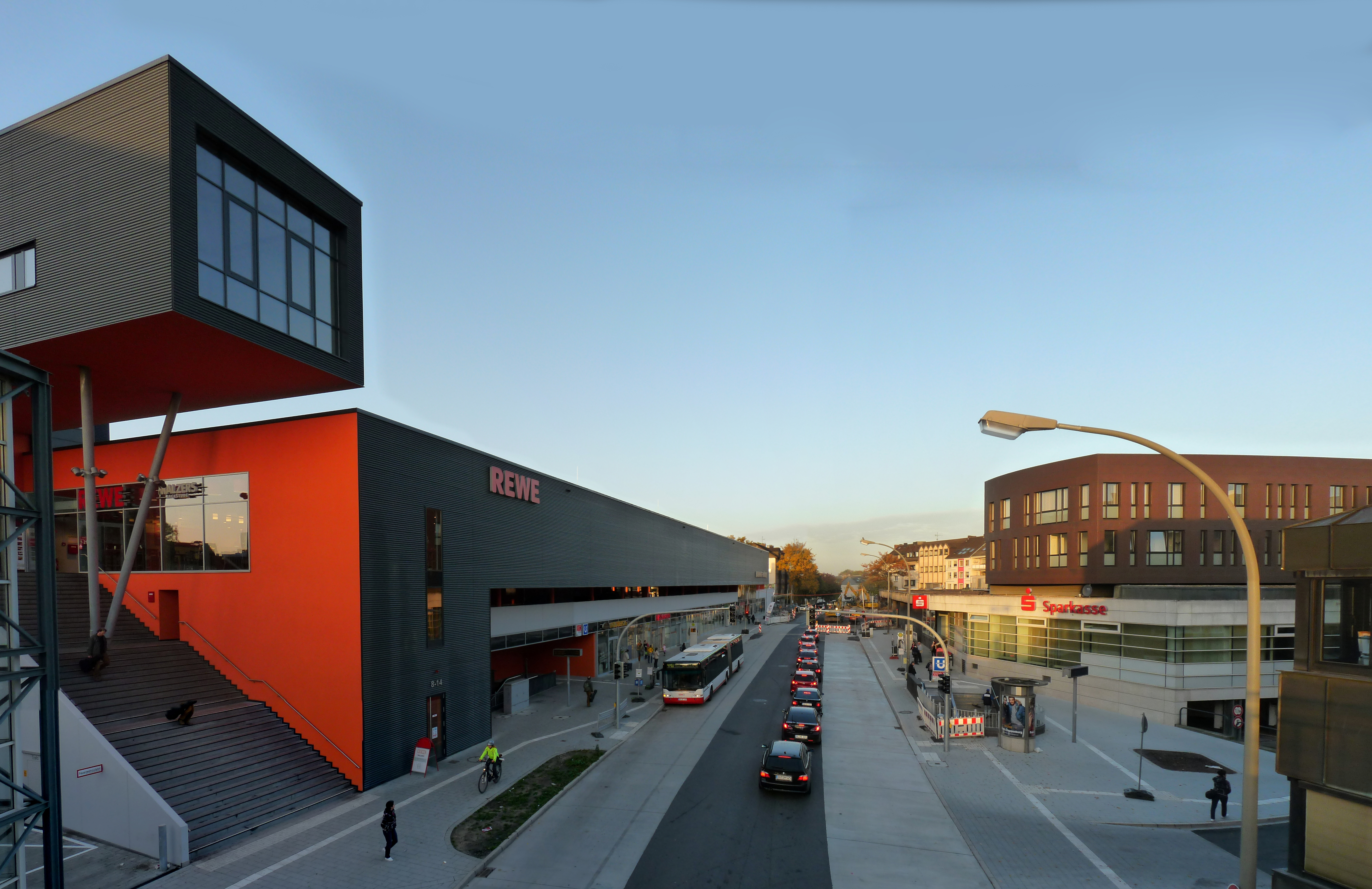 Neues Bahnhofsgebäude in Dortmund-Hörde im Oktober 2012; Blick von der Hörder Brückenstraße